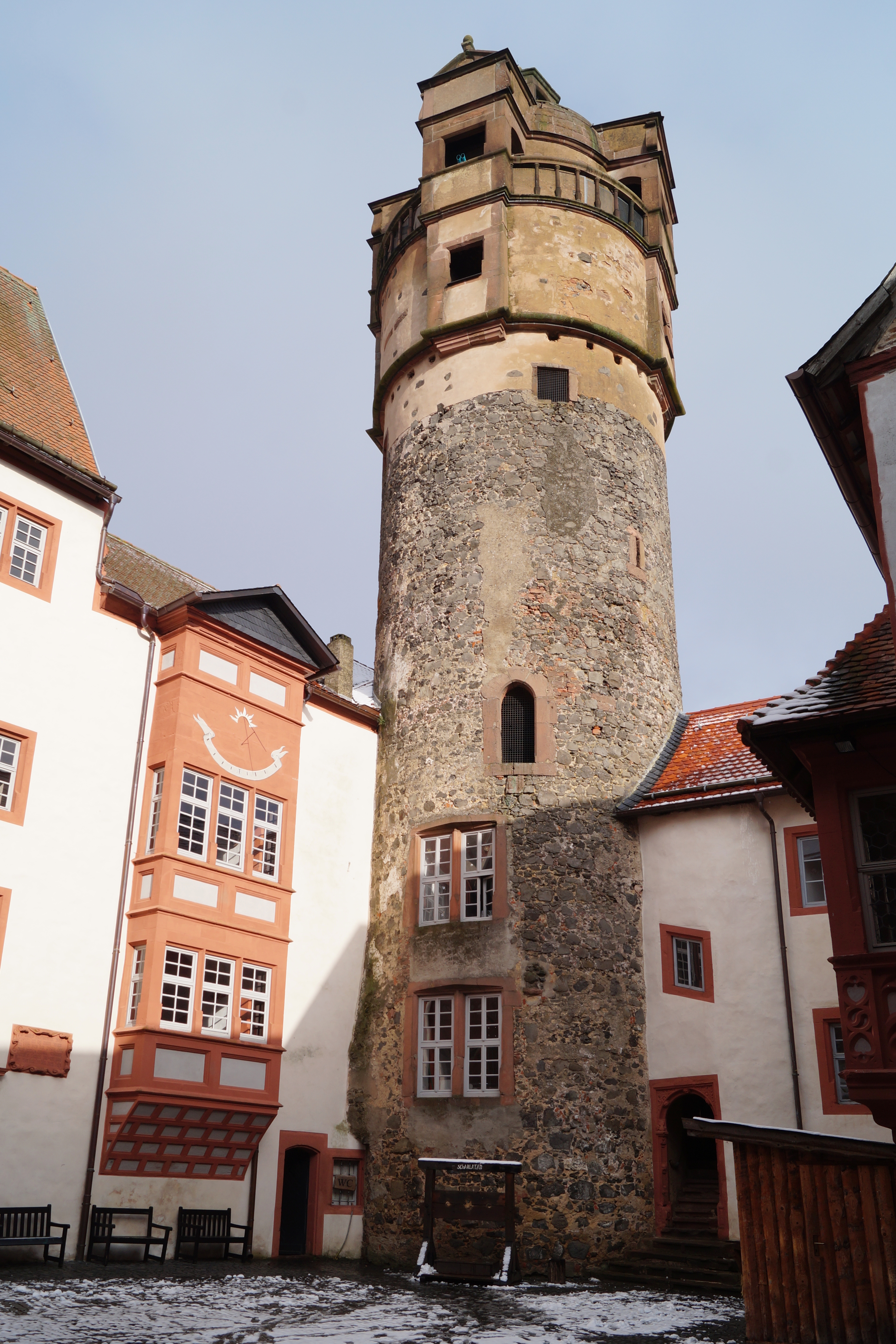 Burg Ronneburg in Hessen, Ansicht des Bergfriedes vom inneren Burghof.